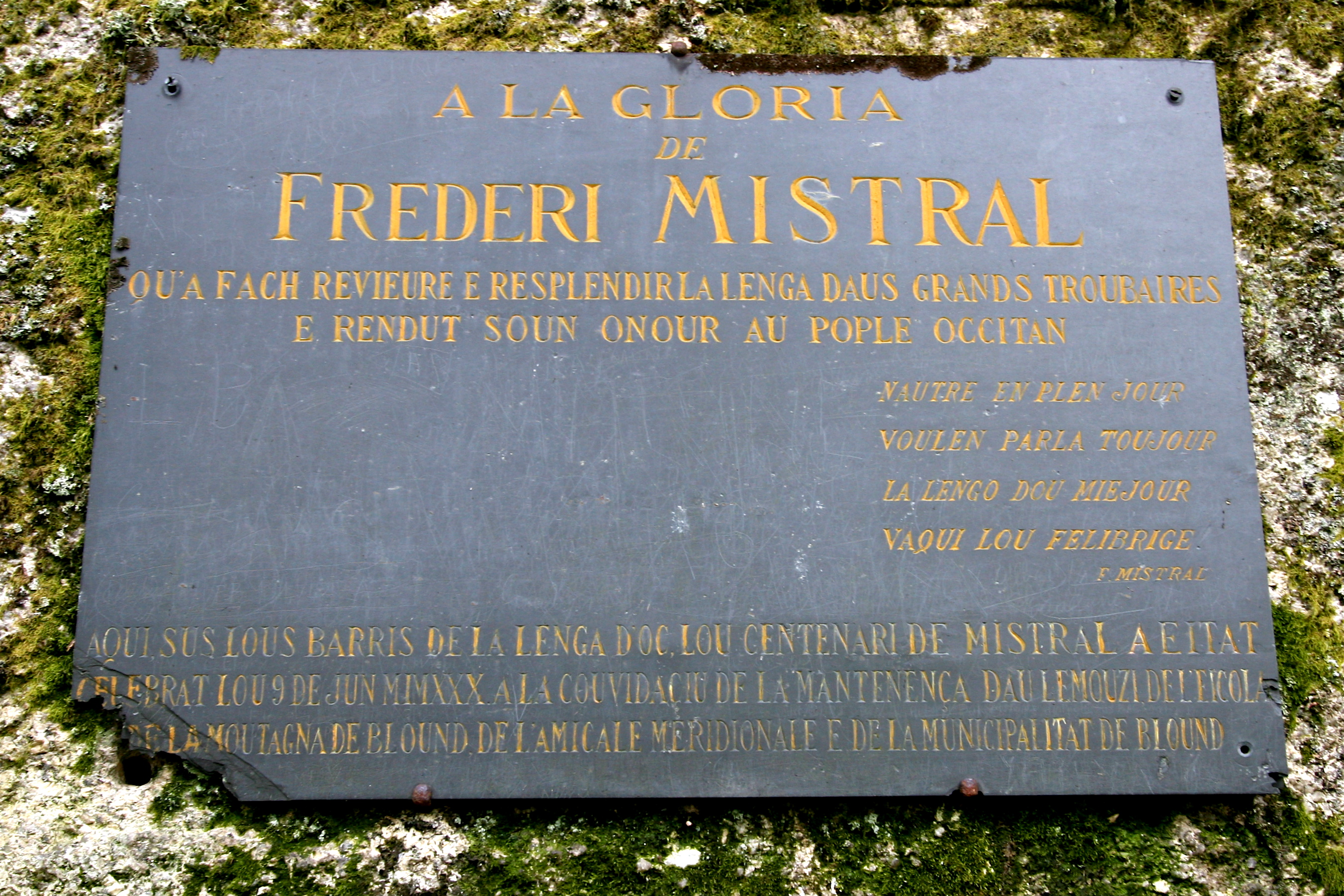 Plaque à la gloire de Frédéric Mistral, Rochers de Puychaud, Blond, Haute-Vienne, France